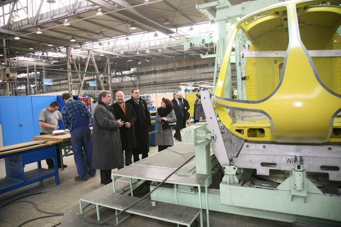 We wtorek 24 marca 2009, szef Kancelarii Prezydenta Piotr Kownacki odwiedził Lublin i Świdnik. Piotr Kownacki i Elżbieta Kruk w zakładach PZL Świdnik.